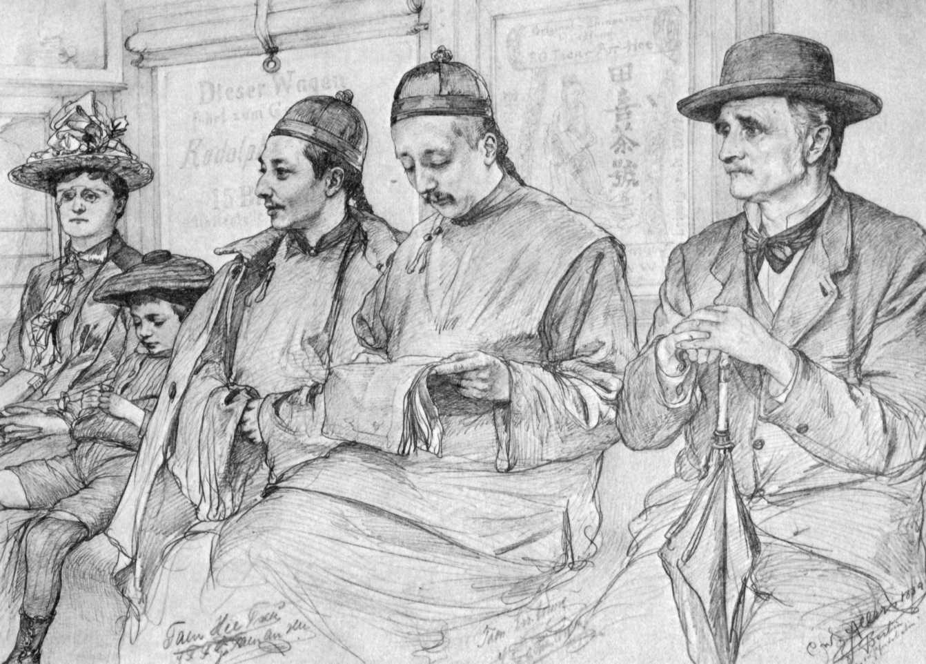 in der Pferdebahn in Berlin. In der Mitte Angehörige der Firma F. G. Taen-Arr-Hee (siehe Werbung im Hintergrund sowie Kommentar von Klaus J. Lemmer in der 1979er Ausgabe der Spreeathener, dort Nr. 13). Der Herr rechts ist C.W. Allers' Vater Heinrich Christian Allers (1824-1898). Allers hat die Porträts vermutlich an einem anderen Ort als abgebildet gezeichnet.